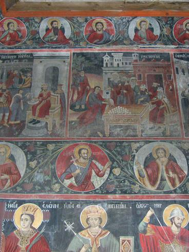 Фреска во Црквата “Успение Богородично” во село Велушина, битолско